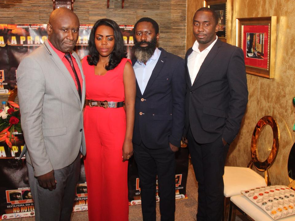 teatro angolano